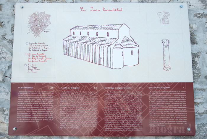 Biograd na Moru